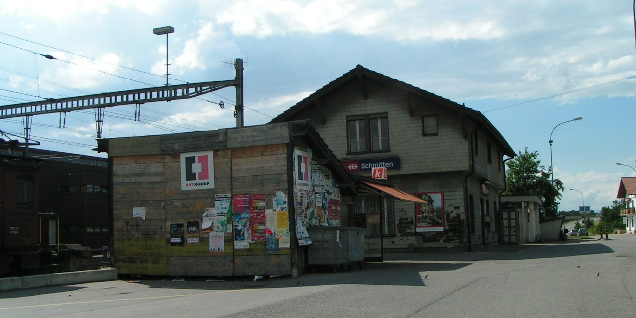 Bahnhof